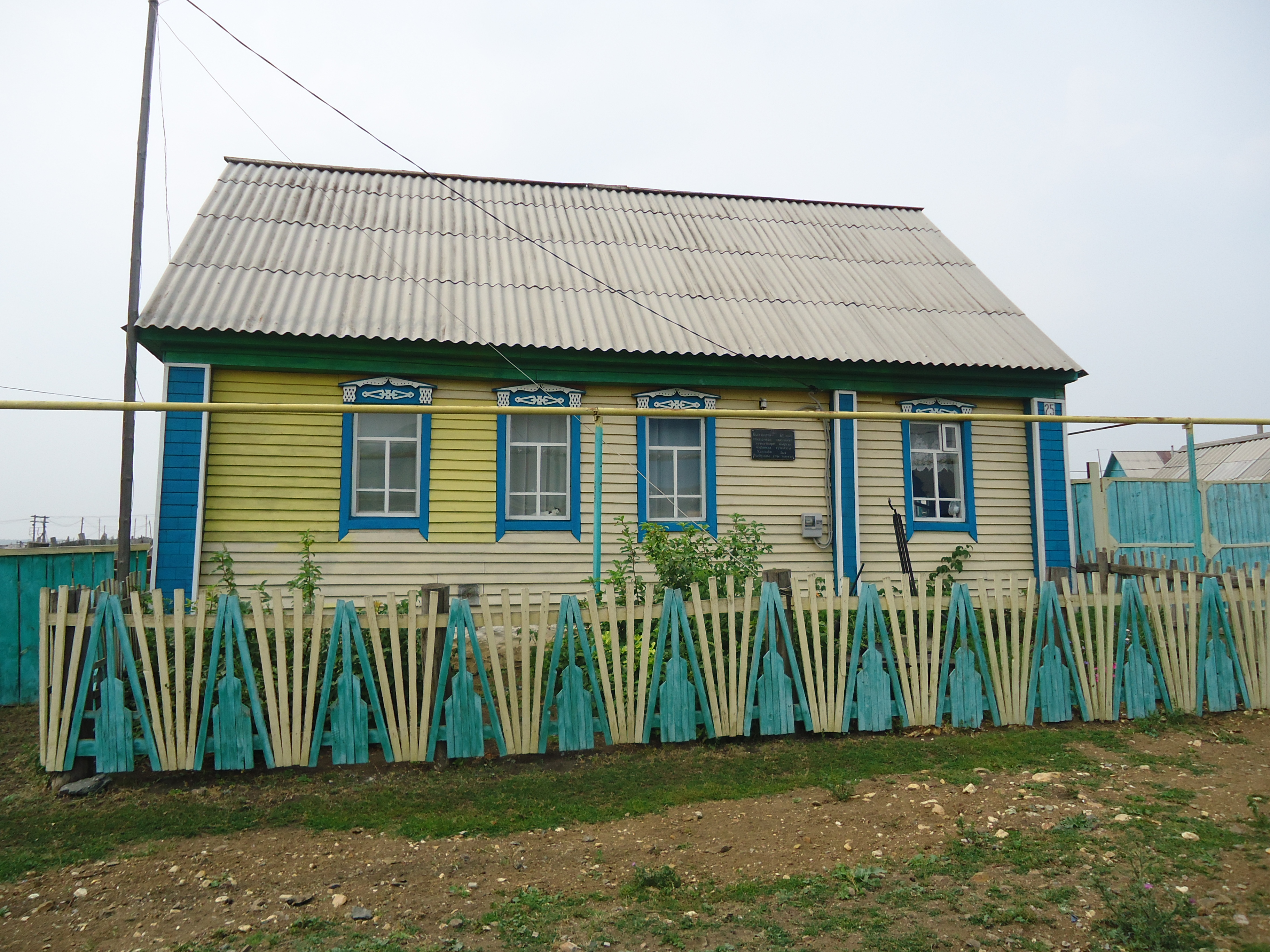 Башҡортса: Мәшһүр ҡурайсы Зыя Хәлилов тыуған йорт. Баймаҡ районы Икенсе Этҡол ауылы